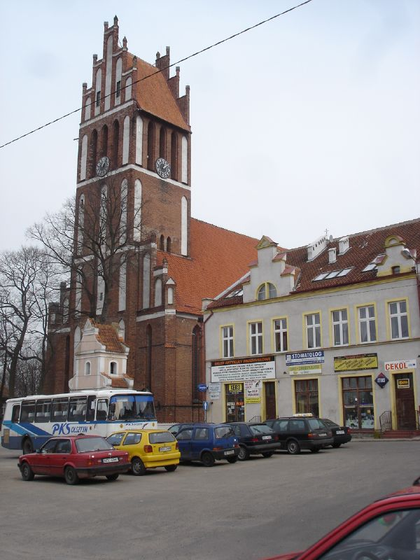 Jeziorany (Poland)